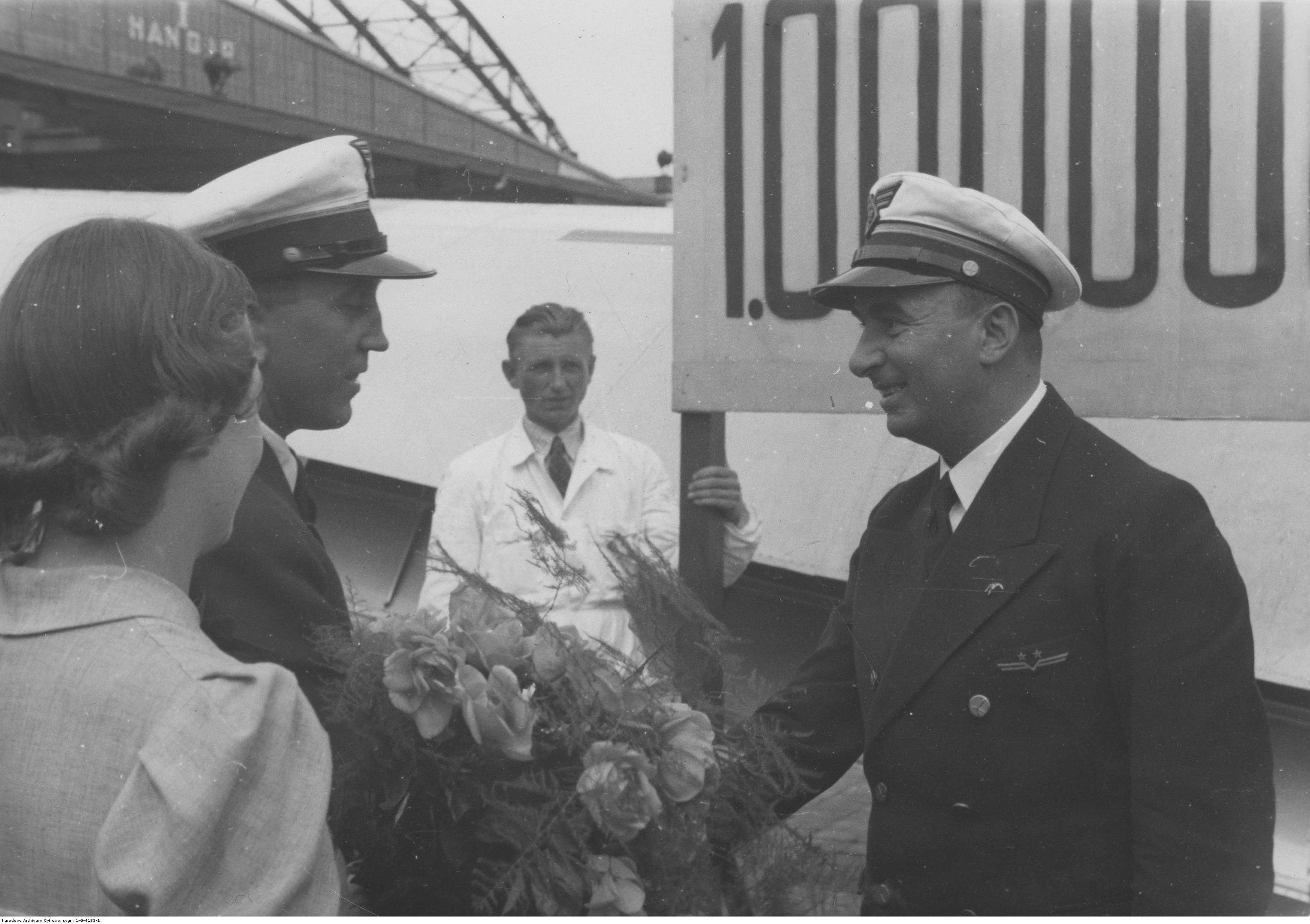 Uroczystość na lotnisku Okęcie z okazji osiągnięcia przez pilota PLL LOT Ludwika Tokarczyka 1000000 km w służbie lotnictwa komunikacyjnego; 9 lipca 1939. Dyrektor PLL LOT Wacław Makowski składa gratulacje pilotowi Ludwikowi Tokarczykowi. Koncern Ilustrowany Kurier Codzienny - Archiwum Ilustracji. Sygnatura: 1-G-4183-1